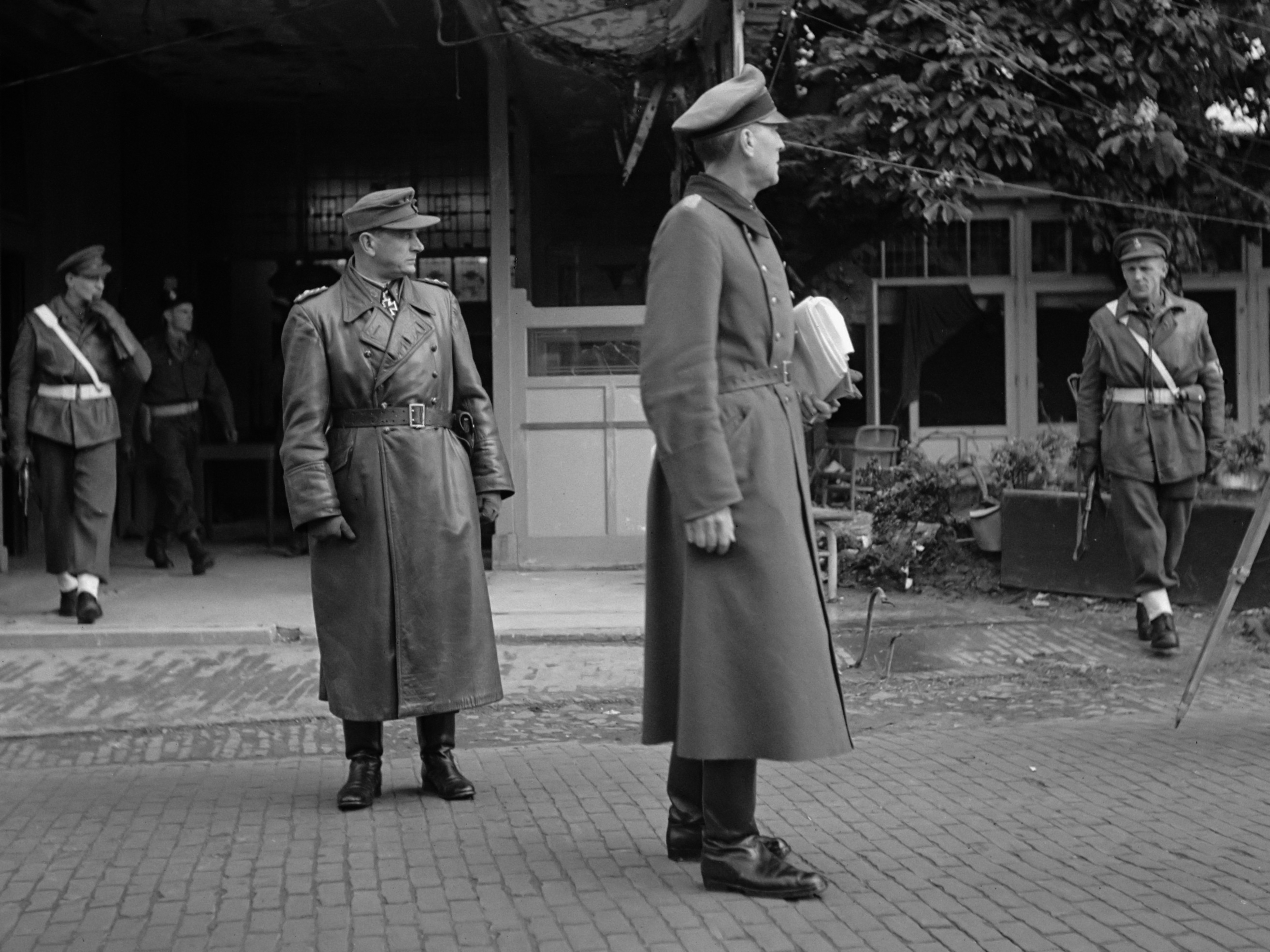 Voorbereidingen en onderhandelingen tot de capitulatie in Wageningen. De Duitse onderhandelingsdelegatie bij Hotel "De Wereld". Links in leren jas de Duitse chef-staf luitenant-generaal Reichelt, rechts voor hem met documenten een tolk 5 mei 1945